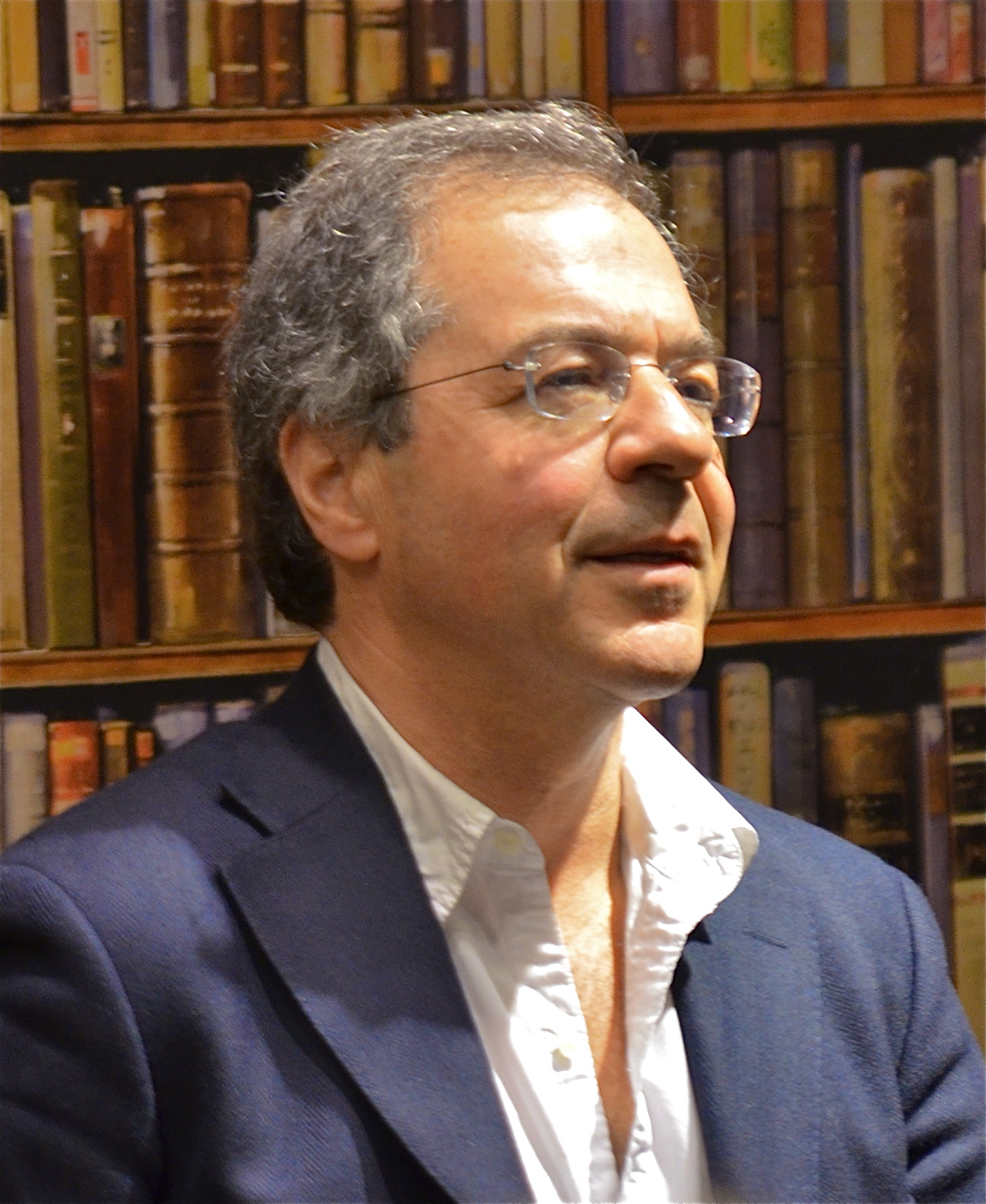 Göran Rosenberg på Akademibokhandeln City i Stockholm 28 april 2012.